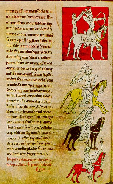 Apokalypsa